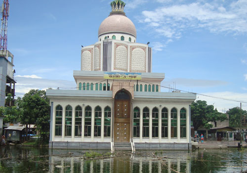 শাহ্‌ সূফী সৈয়দ আহমদ উল্লাহ মাইজভান্ডারী (ক:) এঁর রওজা